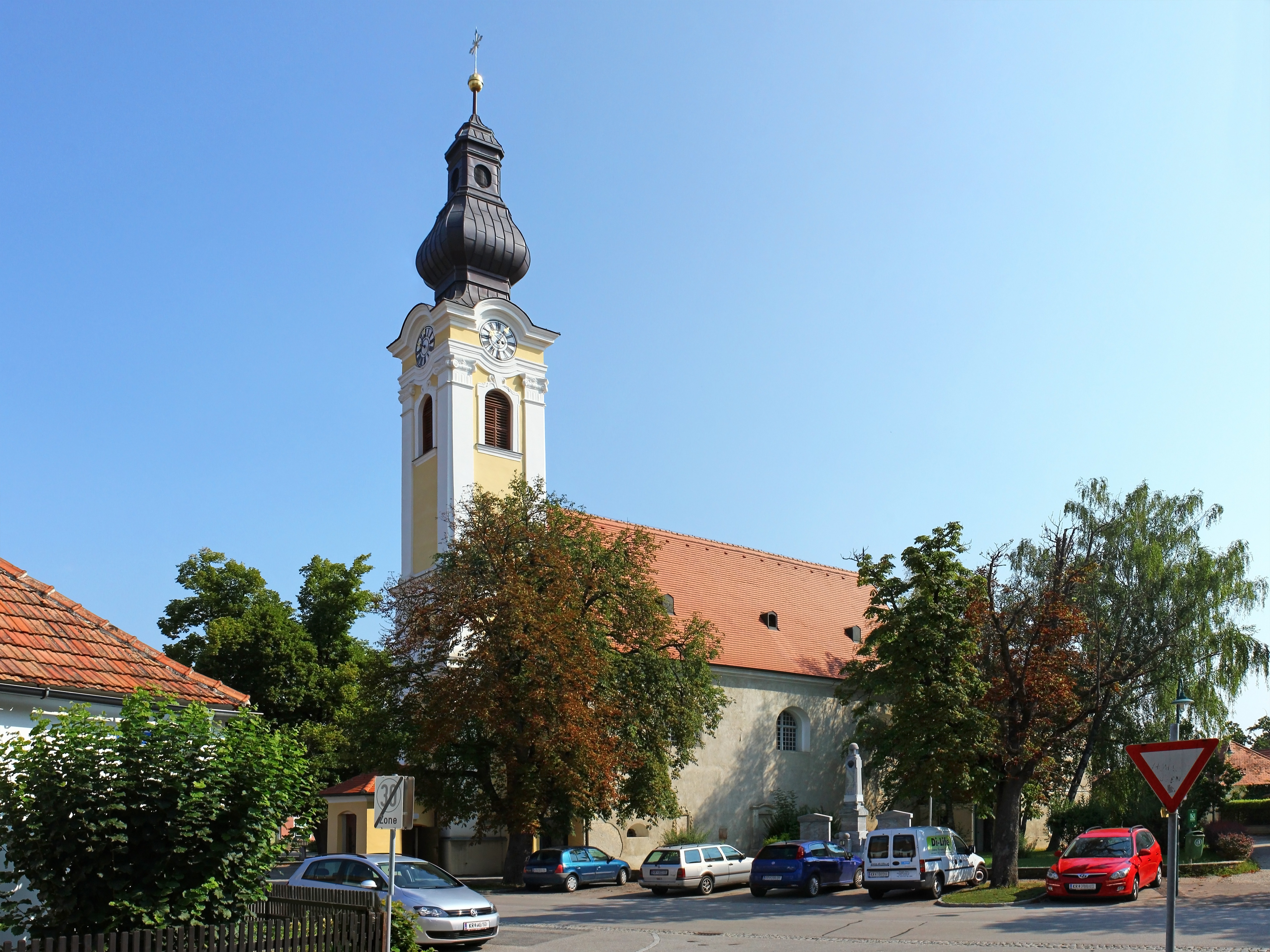 Die an der Durchgangsstraße gelegene Pfarrkirche hl. Jakobus der Ältere ist ein barocker Saalbau mit mittelalterlichem Kern, einem barockisierten, gotischen Chor und einem barocken Westturm.